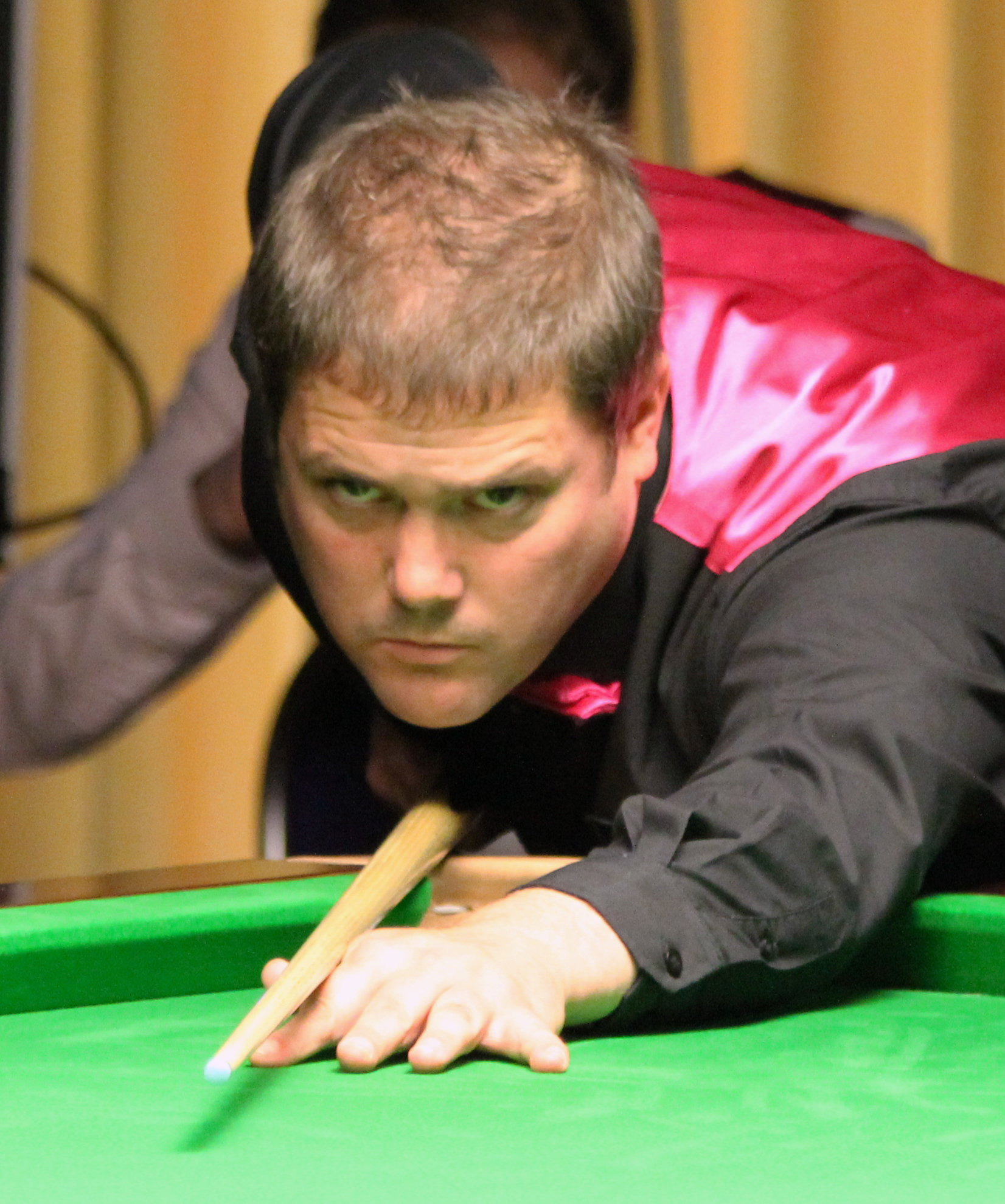 Robert Milkins beim Paul Hunter Classic 2012